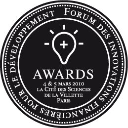 Logo du Forum des innovations financières pour le développement